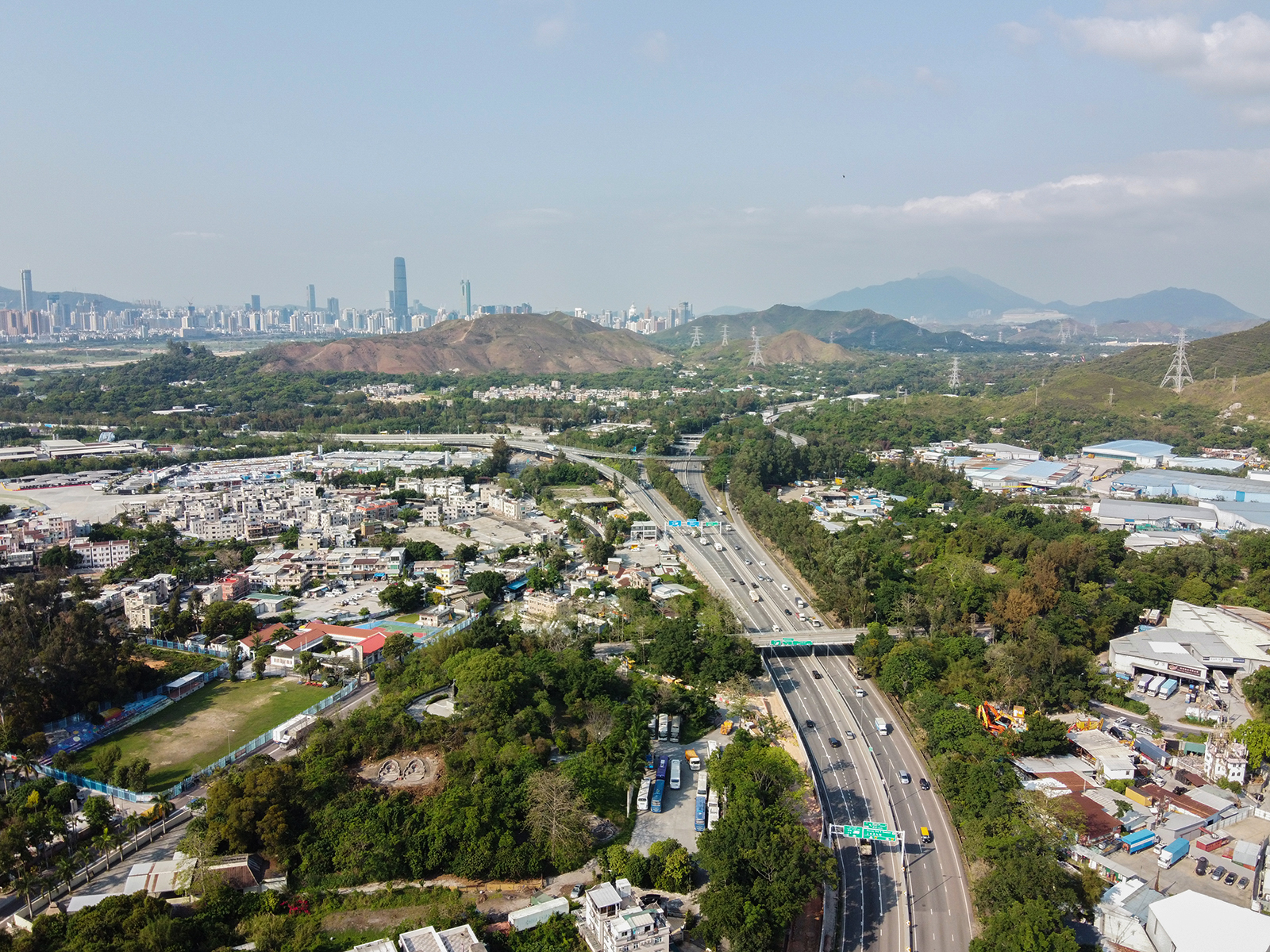 San Tin Aerial view